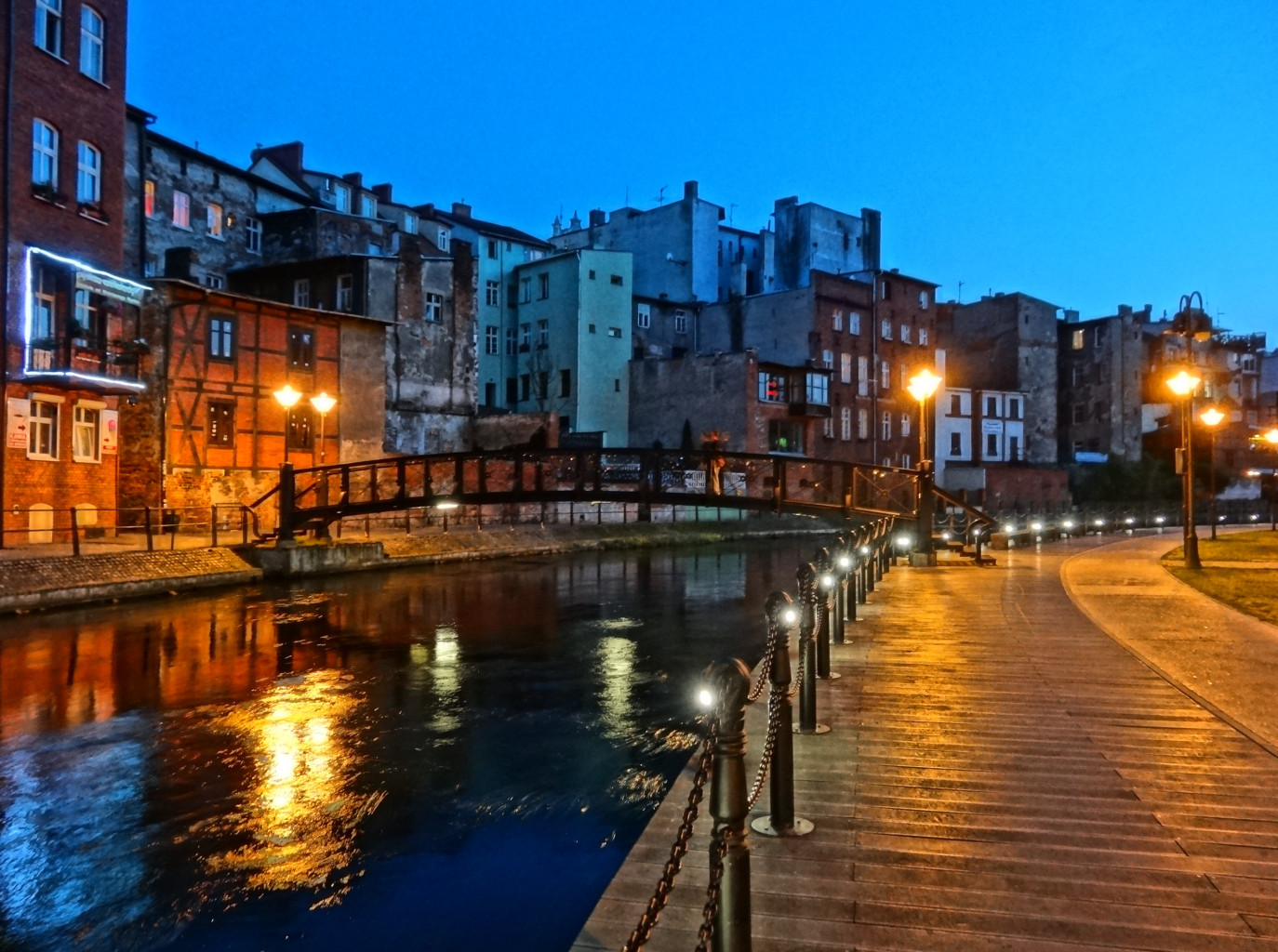 Wenecja Bydgoska – zespół architektoniczny Starego Miasta w Bydgoszczy zbudowany bezpośrednio nad rzeką Młynówką (zbud. 1870-1900).